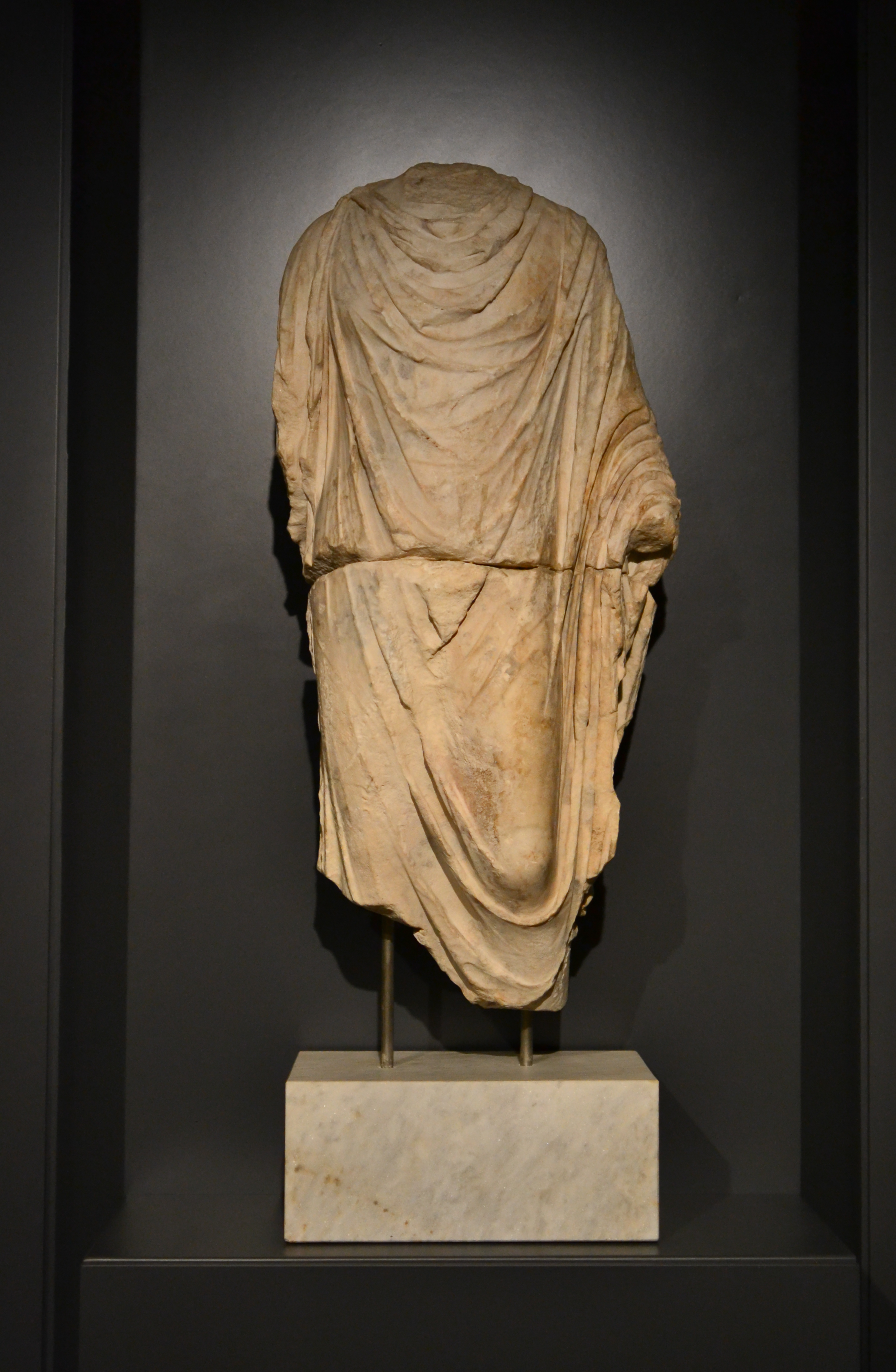 Torso en mármol de Paros, de un camilo de la época del emperador Claudio (41-54 d.C.) Joven ayudante del sacerdote en las ceremonias religiosas. Hallado en 1990, en el recinto del foro, en las excavaciones de la calle sepulcro, 1-15. Museo del Foro de Caesaraugusta.